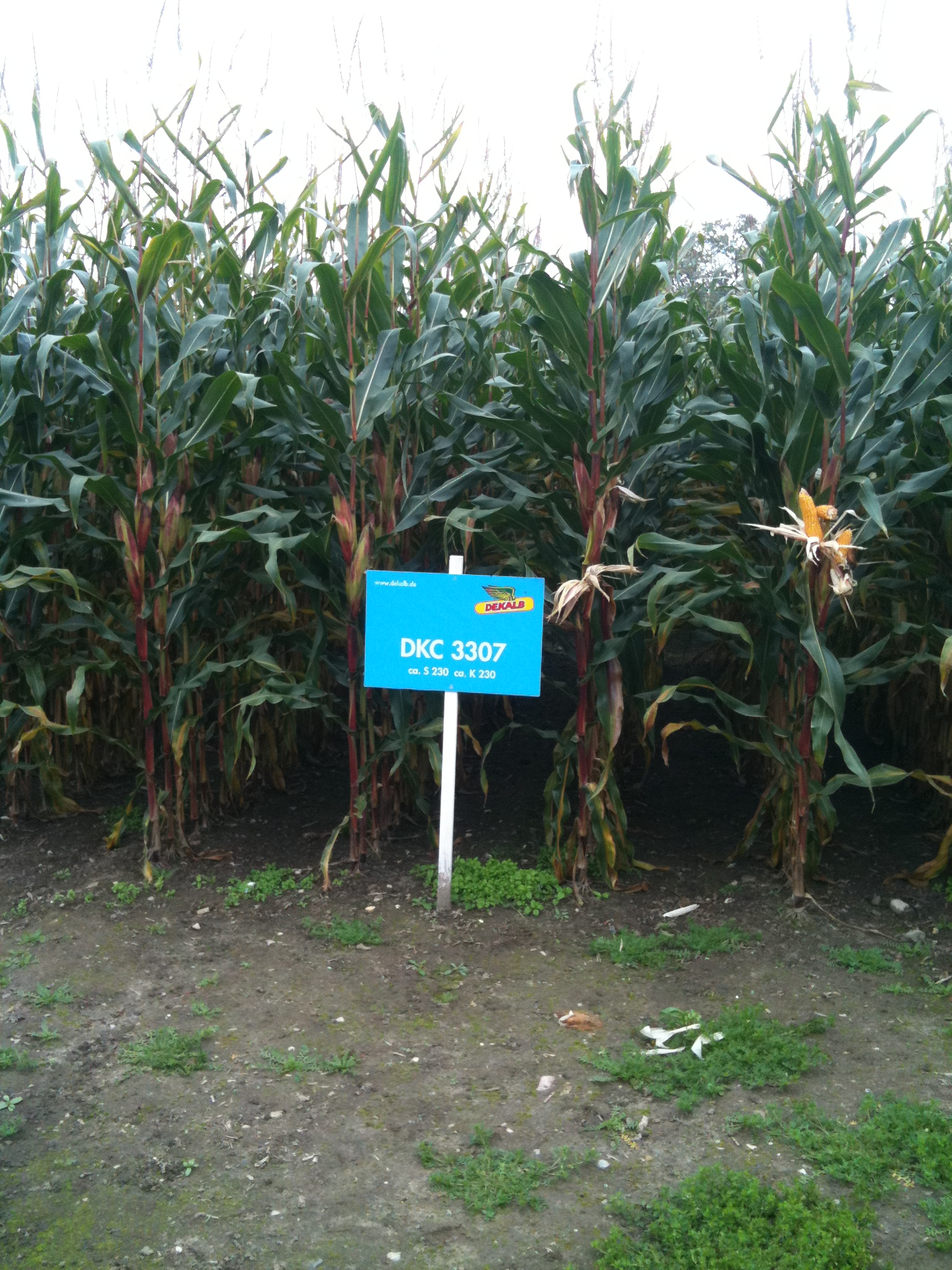 Mais der Firma DeKalb Sorte 3307